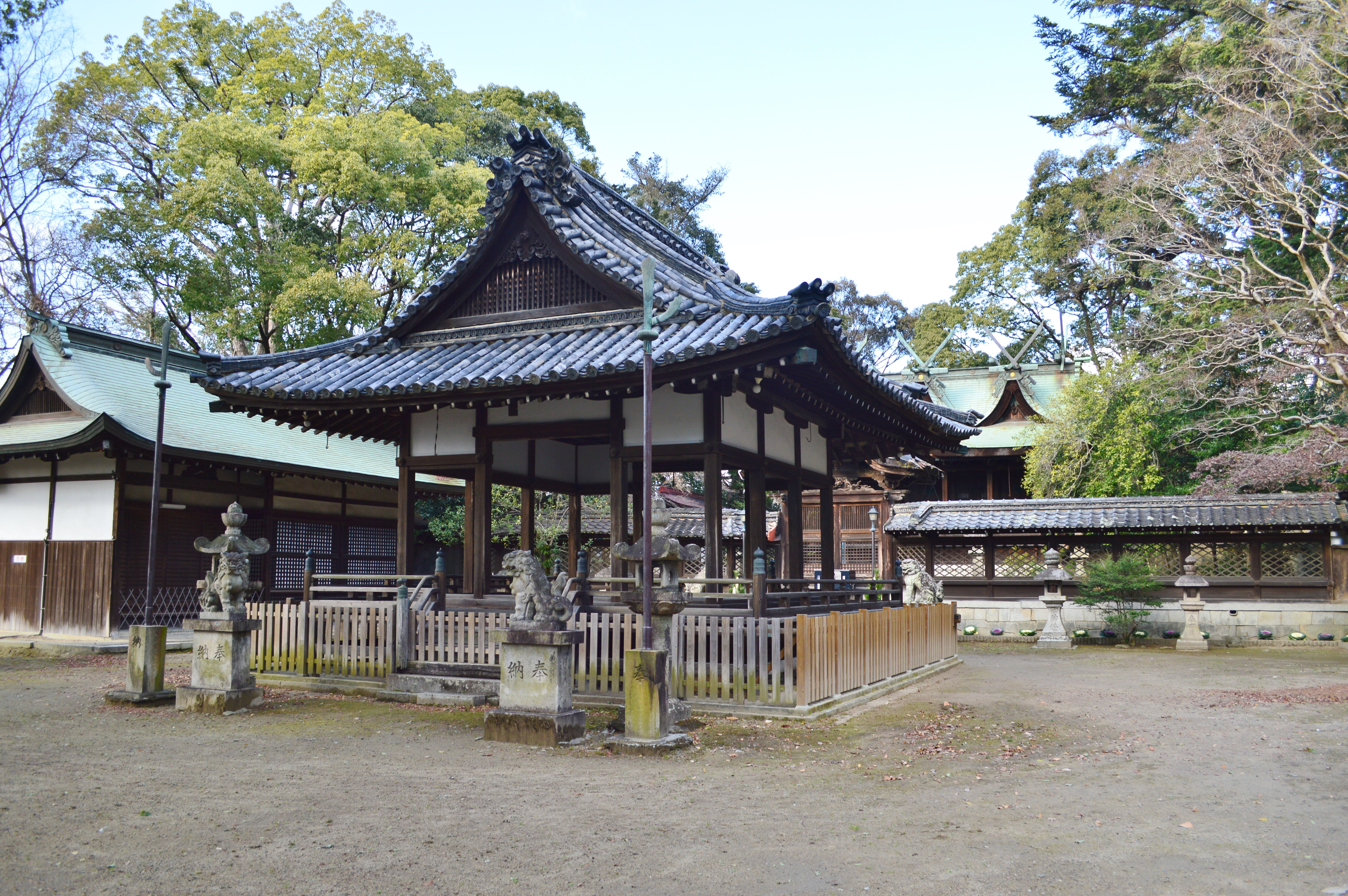 伊居太神社 (池田市) 境内